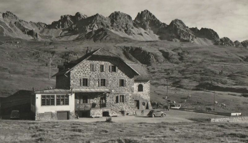 Passo S. Pellegrino 1918 - Ospizio - Cima dell'Uomo 3003